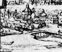 Ansicht von Linz mit Freistz Egeregg und Freisitz Eyring